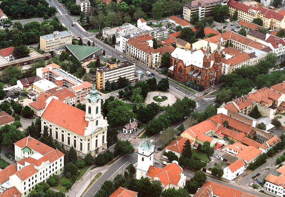 Békéscsaba - Békés megye - Hungary - Europe